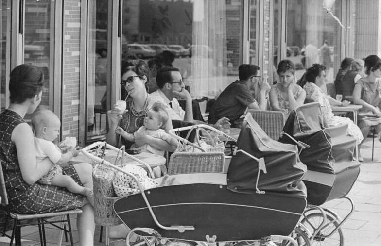 Berlin, Karl-Marx-Allee, Eisdiele Zentralbild Spremberg Nl-At. 26.7.1964 Berlin: Beliebter Treffpunkt an heißen Tagen ist die Mokka-Milch-Eisbar in der Berliner Karl-Marx-Allee. Allerdings dürfen hier nur die Muttis, wie unser Bild zeigt, Eis essen.